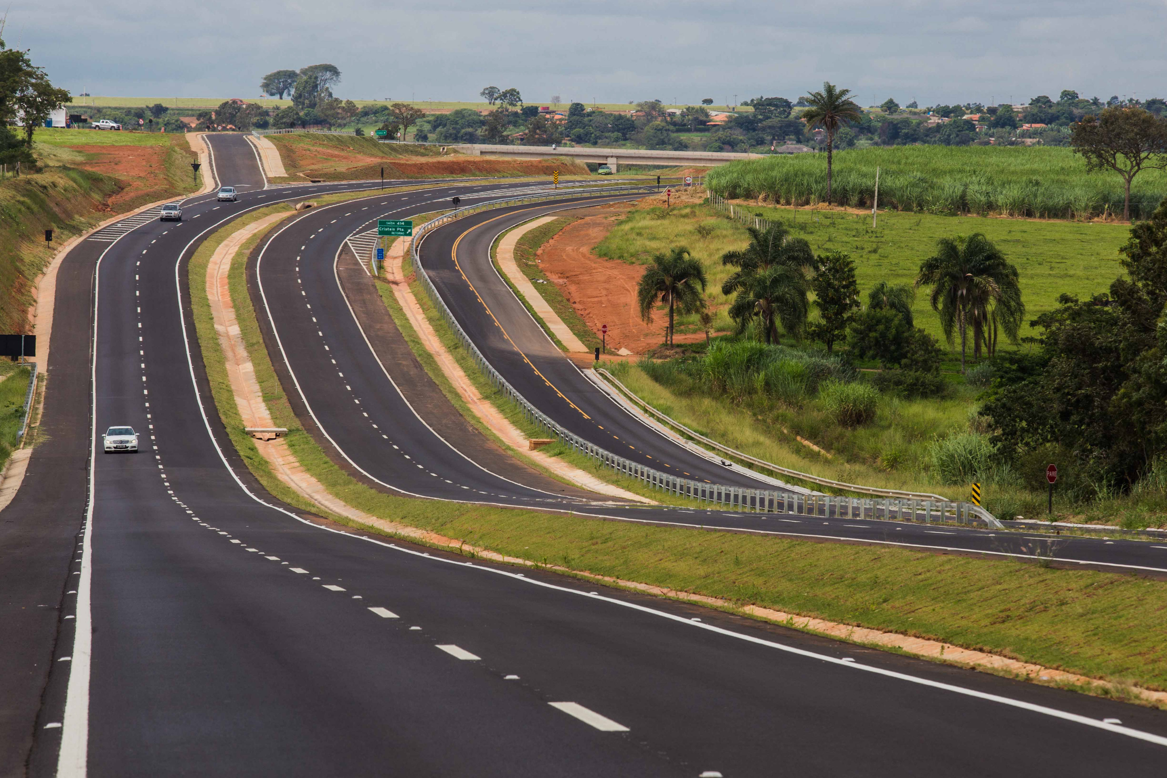 O Governador do Estado de São Paulo Geraldo Alckmin, participou da Entrega da Duplicação e Melhorias da SP-334 do km 413 ao km 421, com a implantação de dois dispositivos - km 414 e km 420 + 400. Local: Cristais Paulista/SP. Data: 21/04/2017. Foto: Alexandre Carvalho/A2img